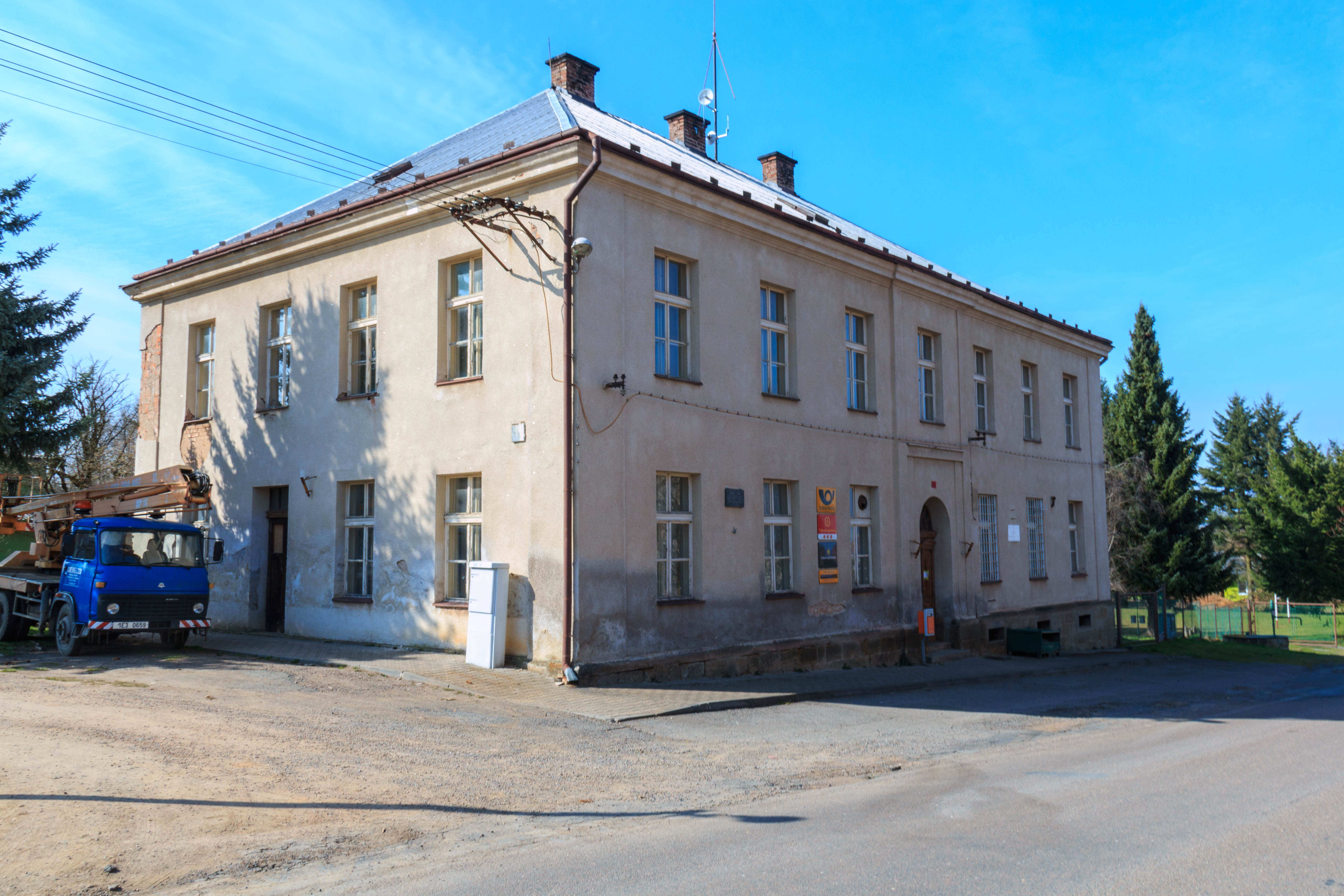 Žumberk pošta